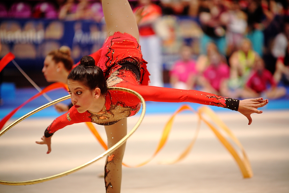 Alejandra Quereda durante una exhibición del conjunto español de gimnasia rítmica en el Campeonato de España individual, clubes y autonomías de 2011, celebrado en Valladolid.